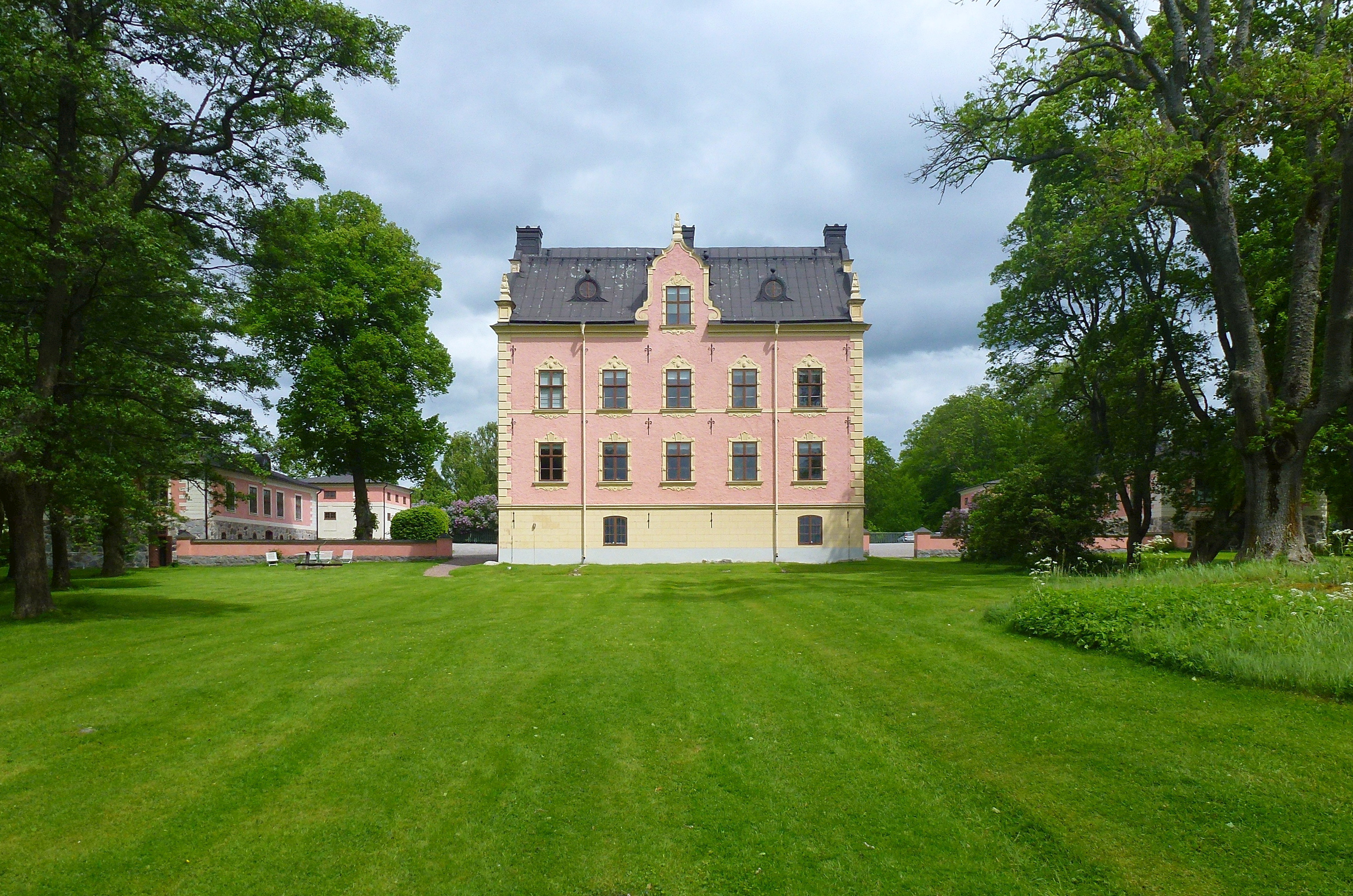 Skånelaholm huvudbyggnad mot sydväst med parken